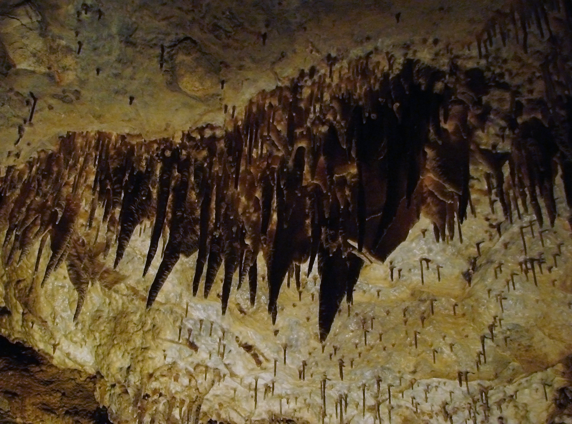 Vue de la grotte de Han, en Belgique.